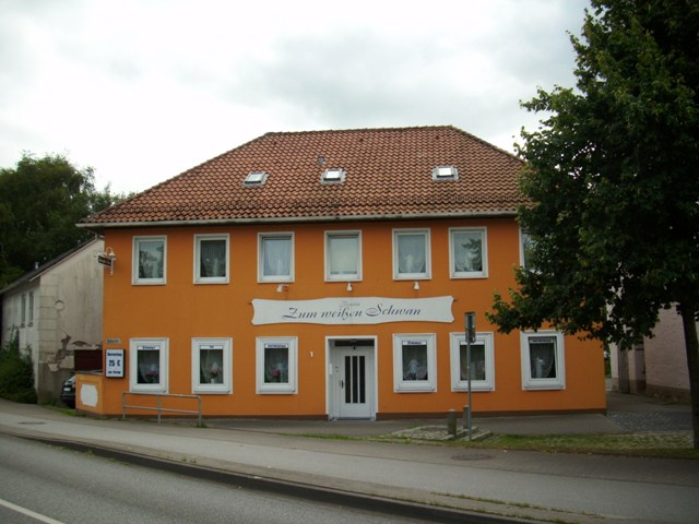 Tidligere gottorpske poststation